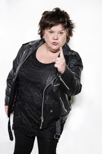 Komikern Ann Westin.